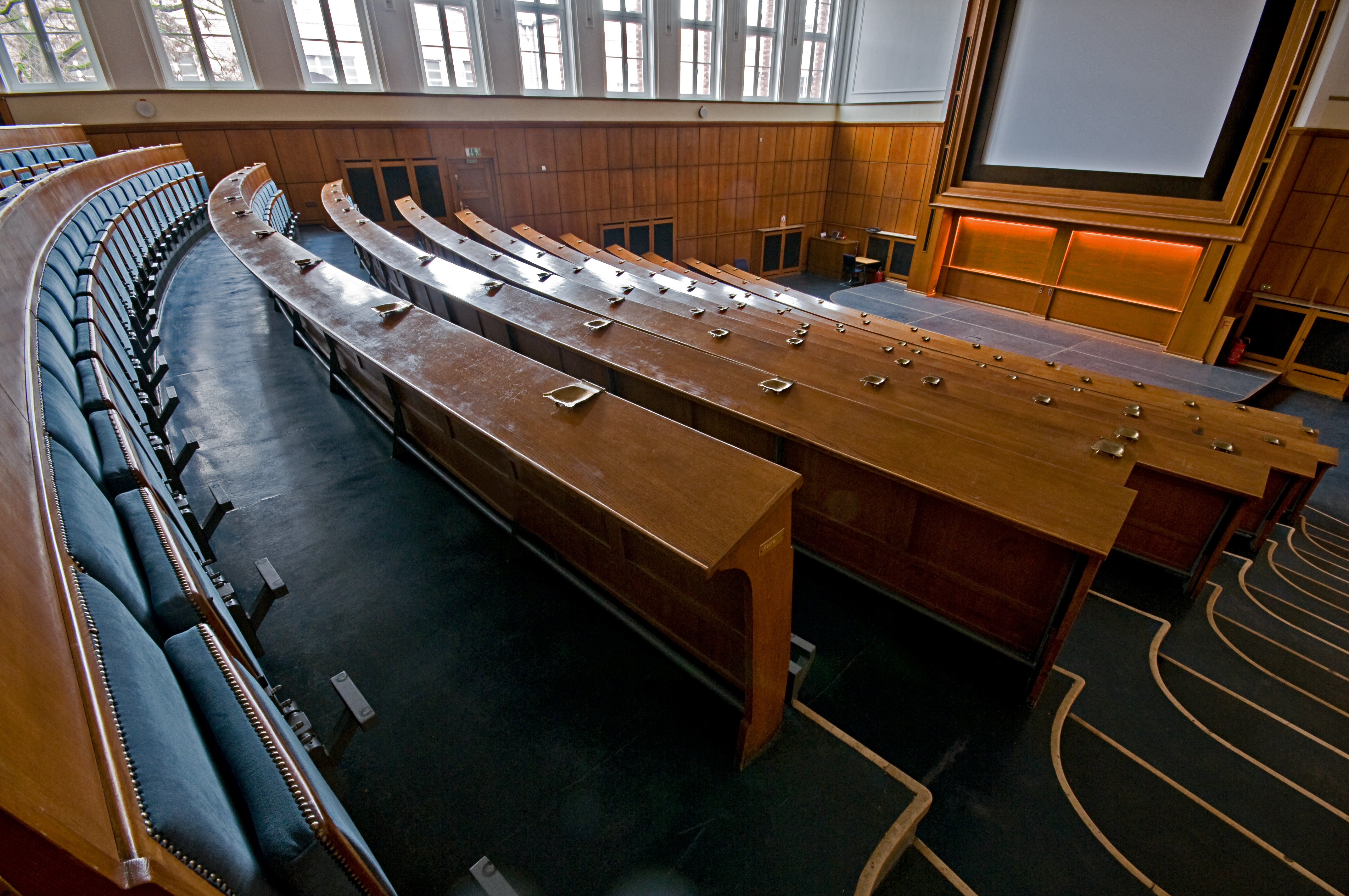 Industriepark HöchstBehrensbau: Hörsal